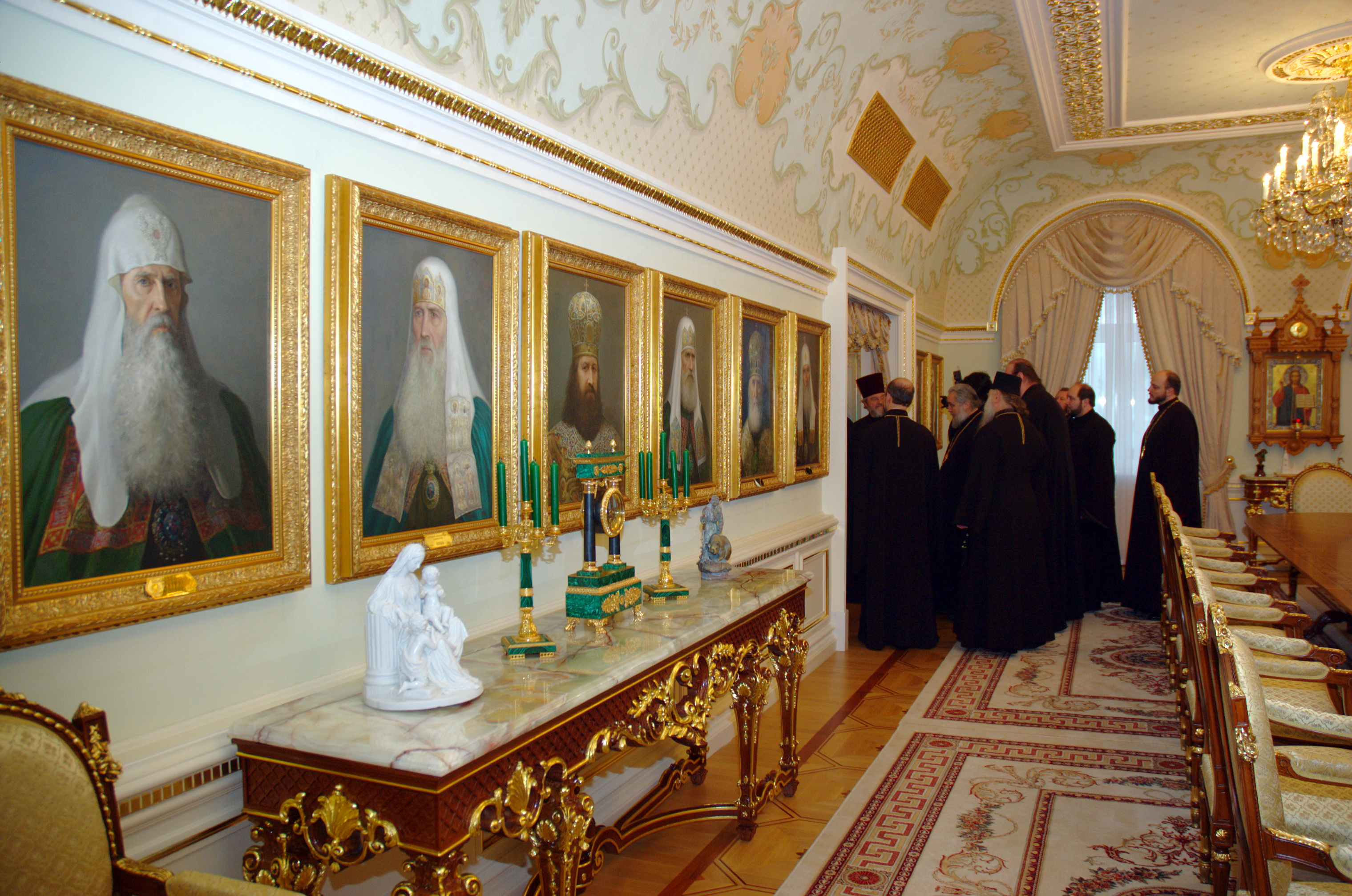 Вдоль одной из стен зала синодальных заседаний в резиденции Патриарха Московского и всея Руси в Переделкине расположены портреты русских патриархов работы заслуженного художника России Виктора Шилова: Иосаф I, Иосиф, Никон, Иосаф II, Питирим, Иоаким (портреты других патриархов на фотографии не видны).